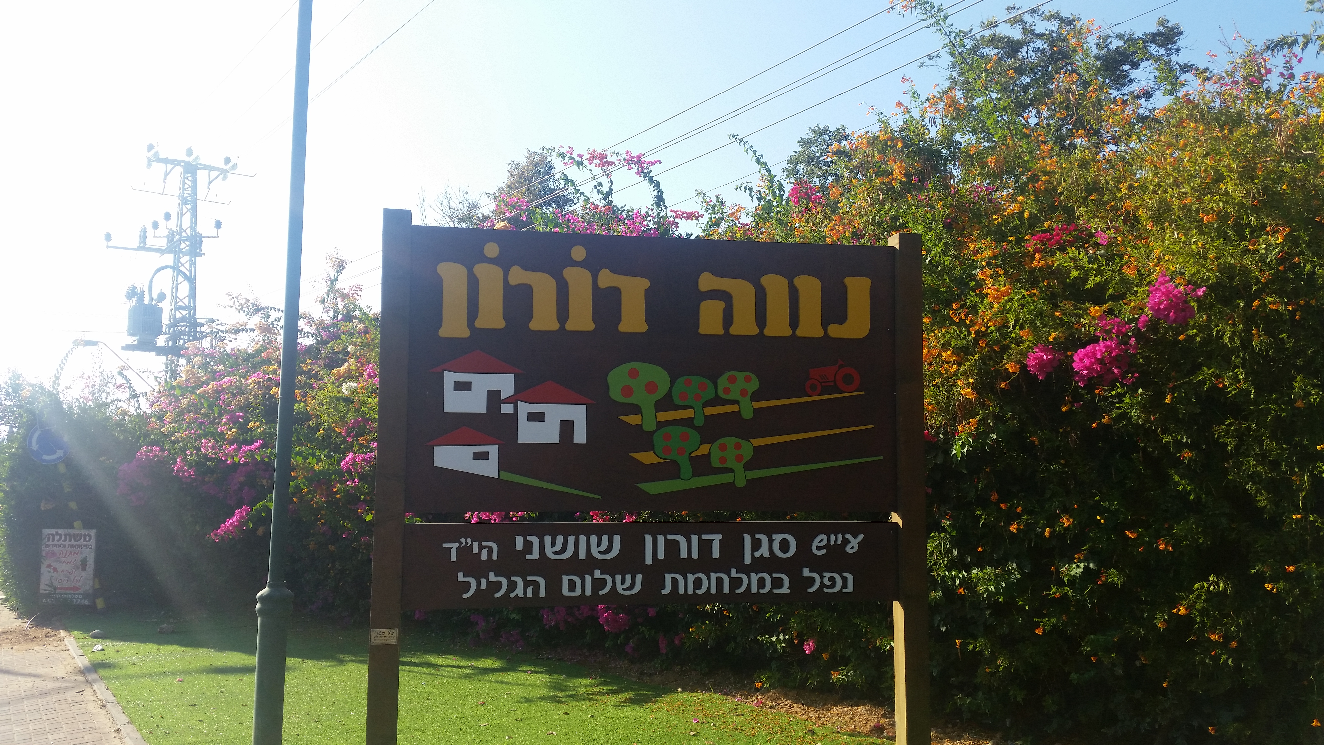 שלט הכניסה למושב נווה דורון בעיר באר יעקב